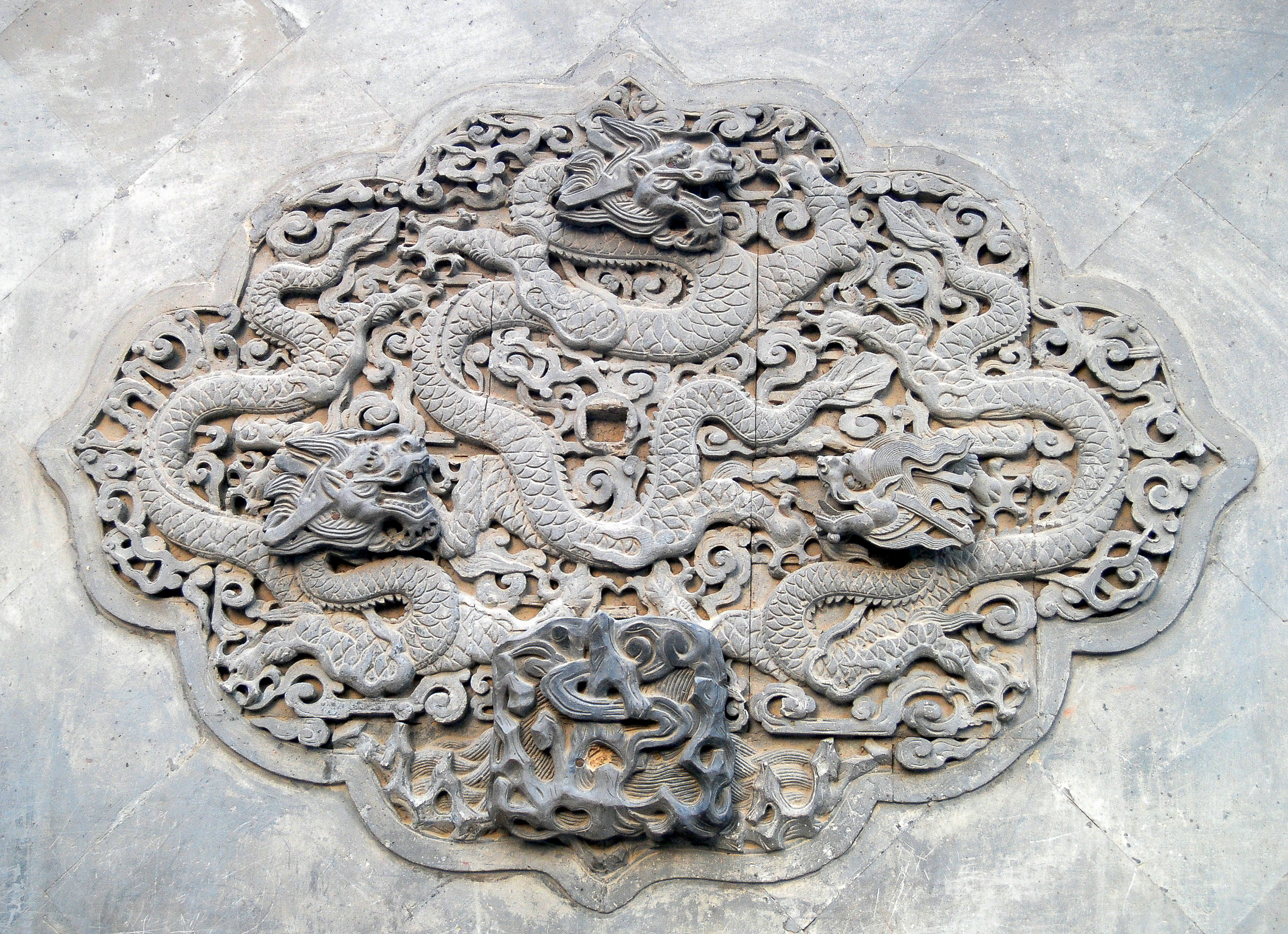 中文（中国大陆）: 颐和园三龙浮雕